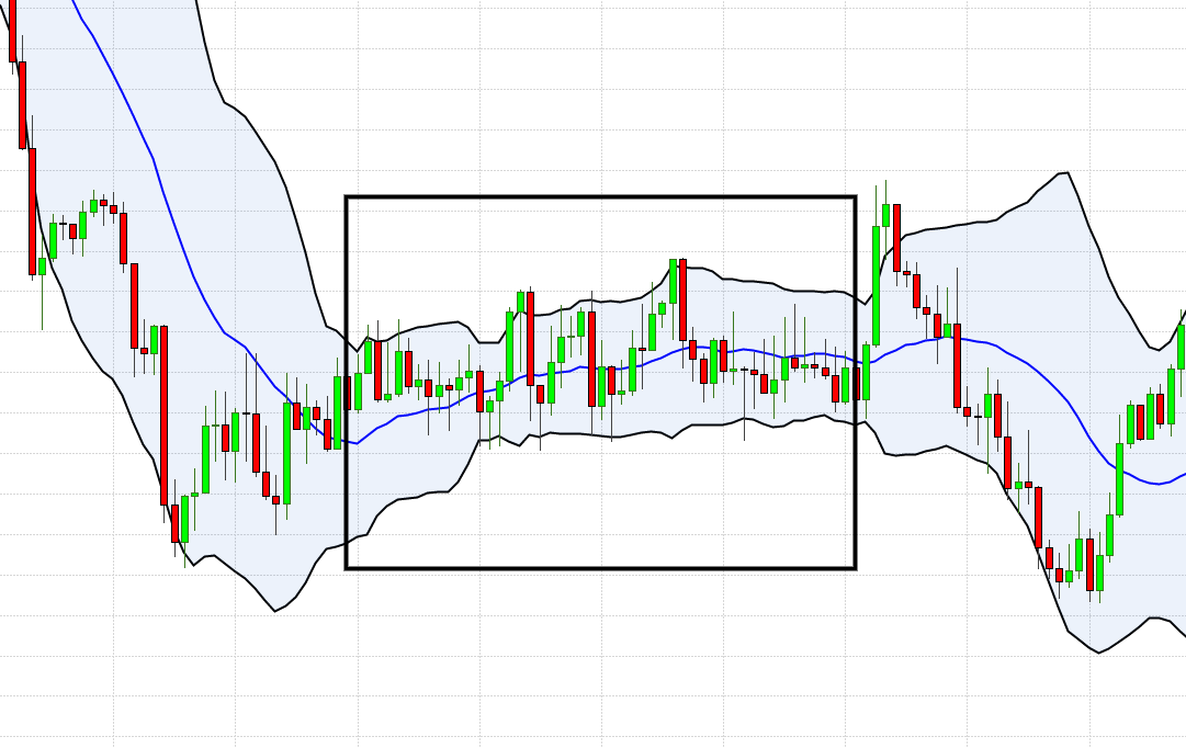 Bandes de bollinger, période 20, écart type 2. Illustration d'une période de "range" serré avec des bandes parallèles et plates.